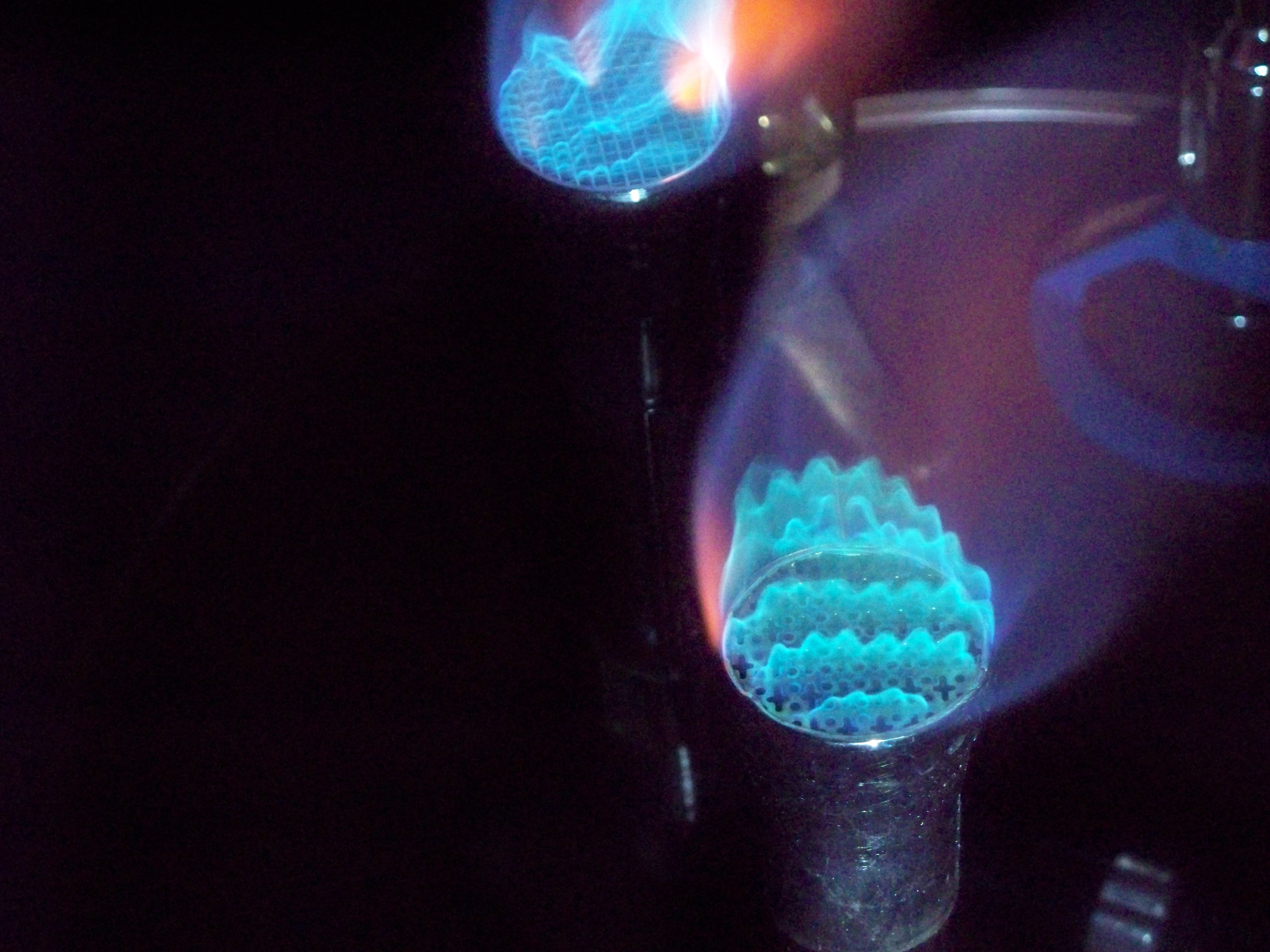 Meker-Fisher burners.